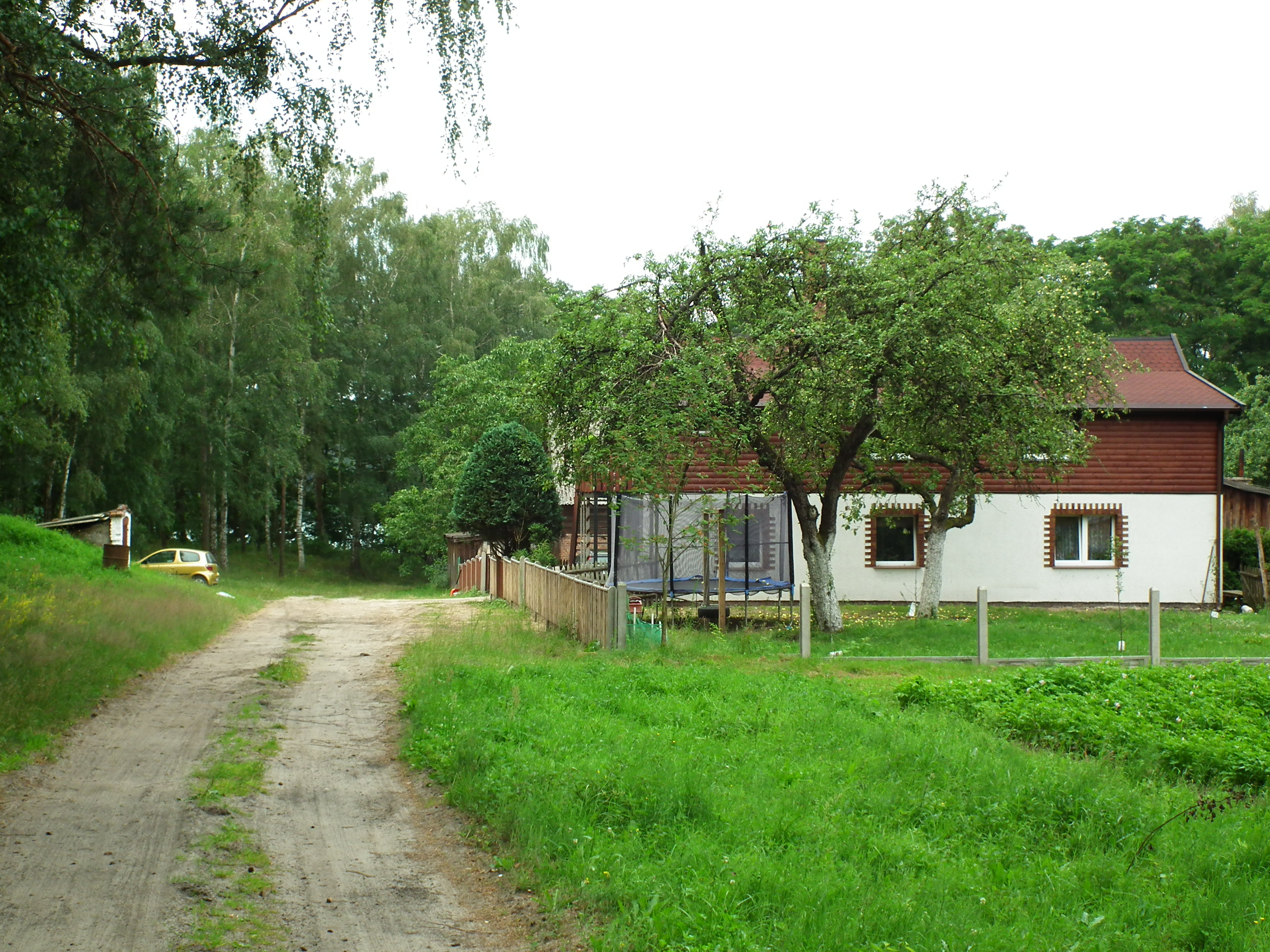 Osada Lichwin w Puszczy Noteckiej.